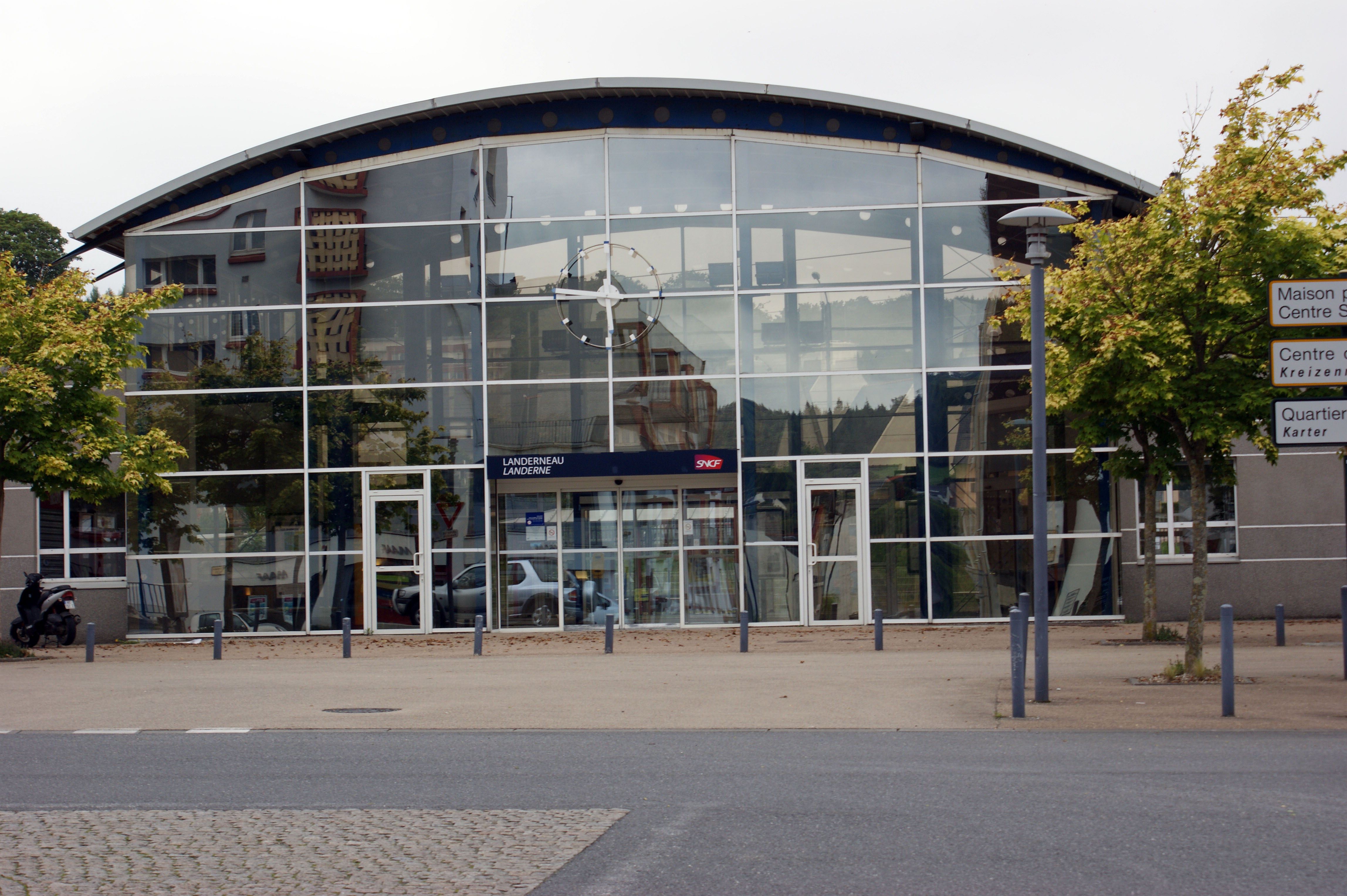 L'entrée de la gare SNCF de Landerneau.